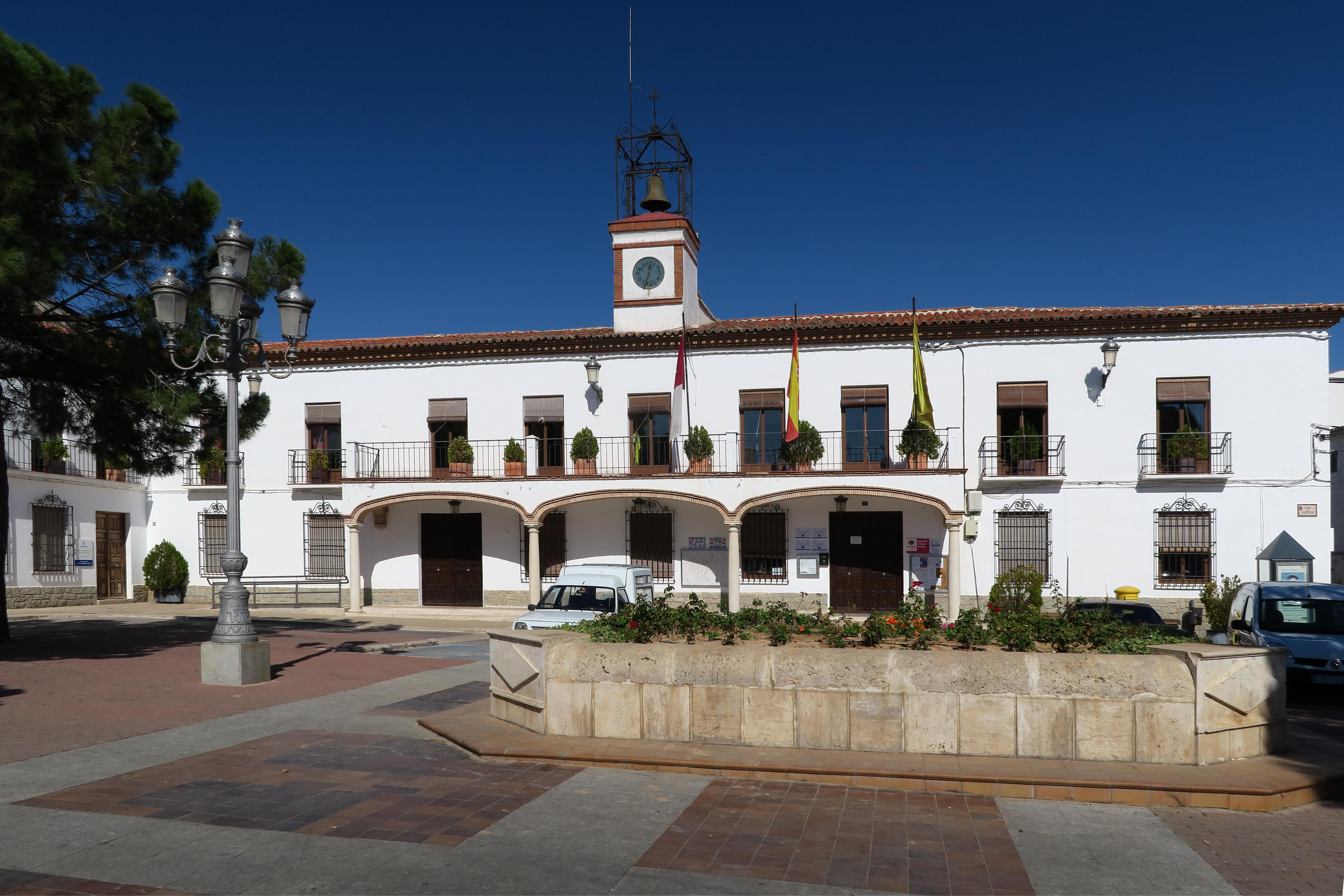 Ayuntamiento de Villarrubia de Santiago